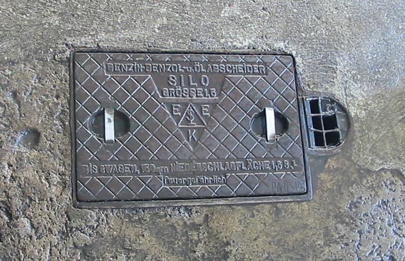 Bild eines alten Guß-Benzinabscheiders vor dem Ausbau